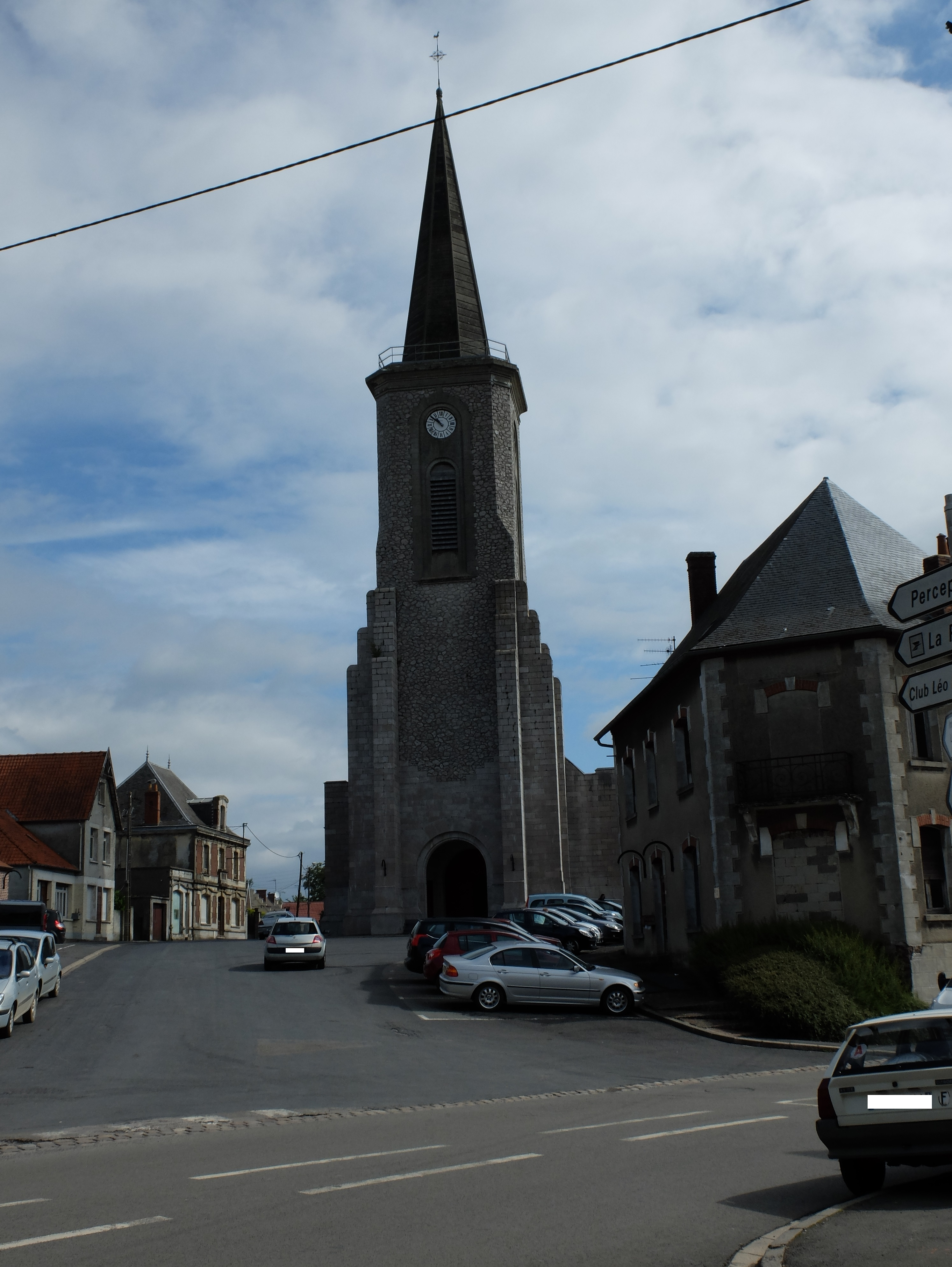 Vue de l'église et de la place attenante de Croisilles (62).